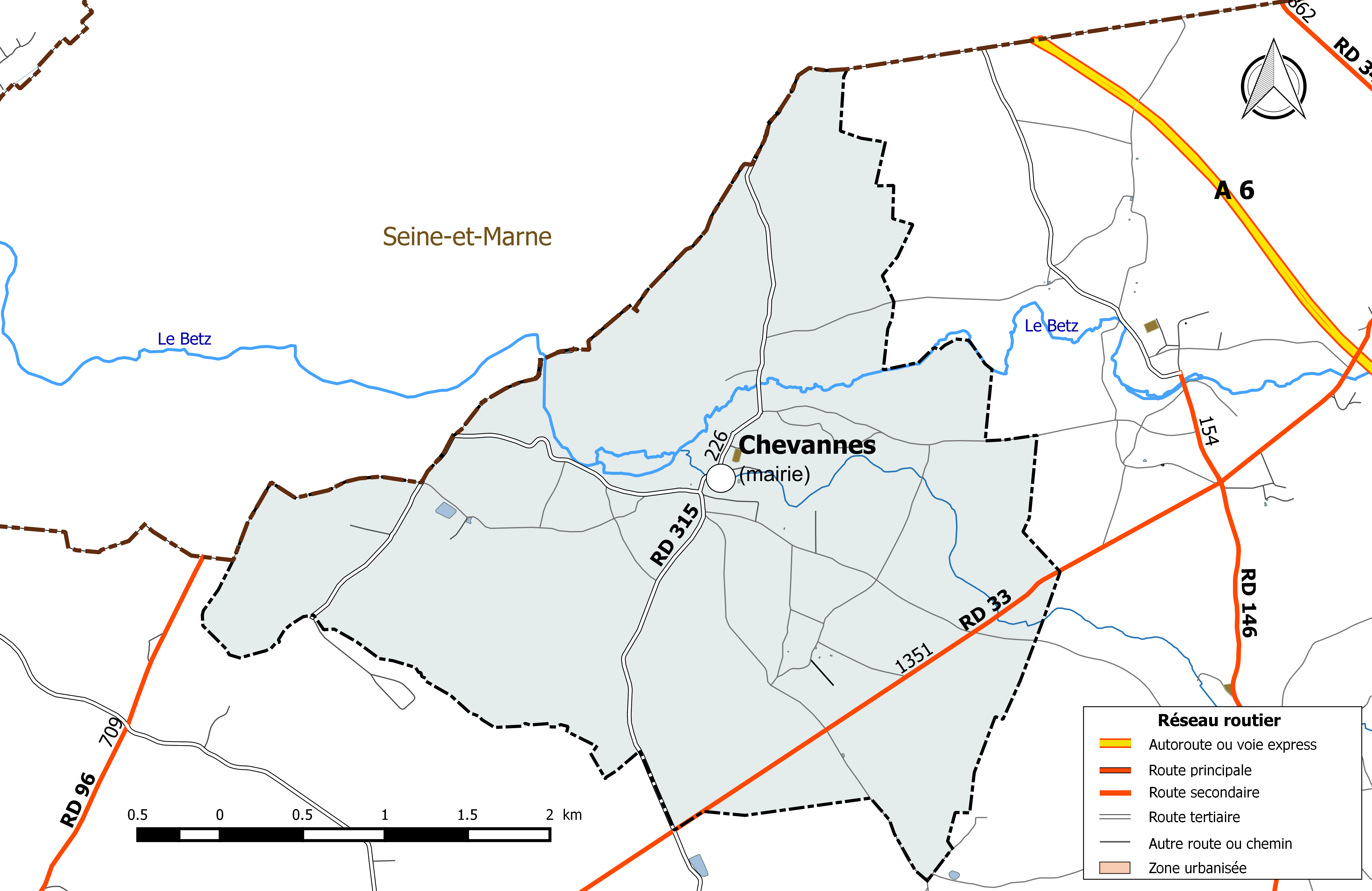 Carte du réseau routier de la commune de Chevannes (Loiret).